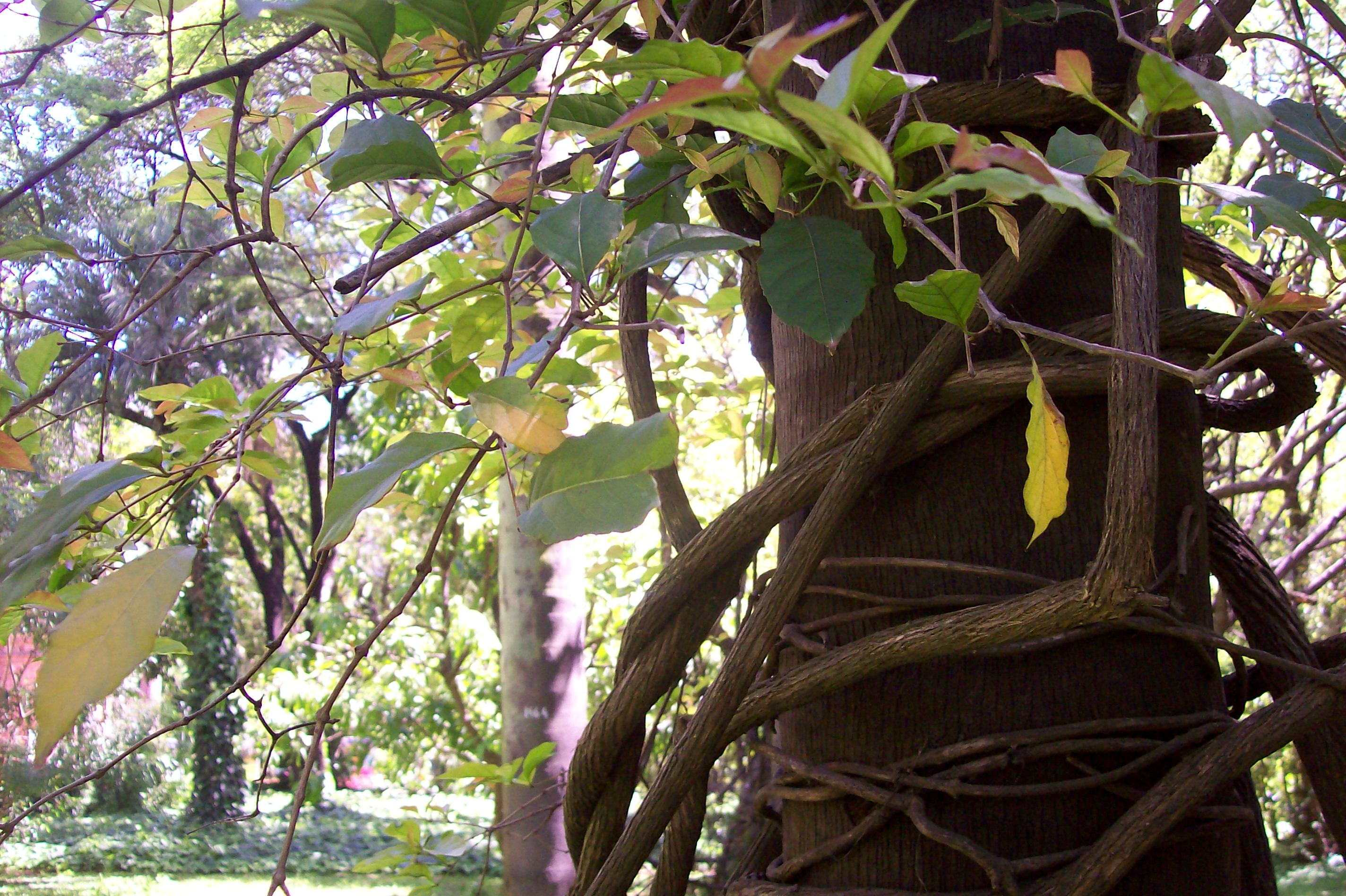 arbusto que crece enroscado a otro árbol, o al ras del suelo.